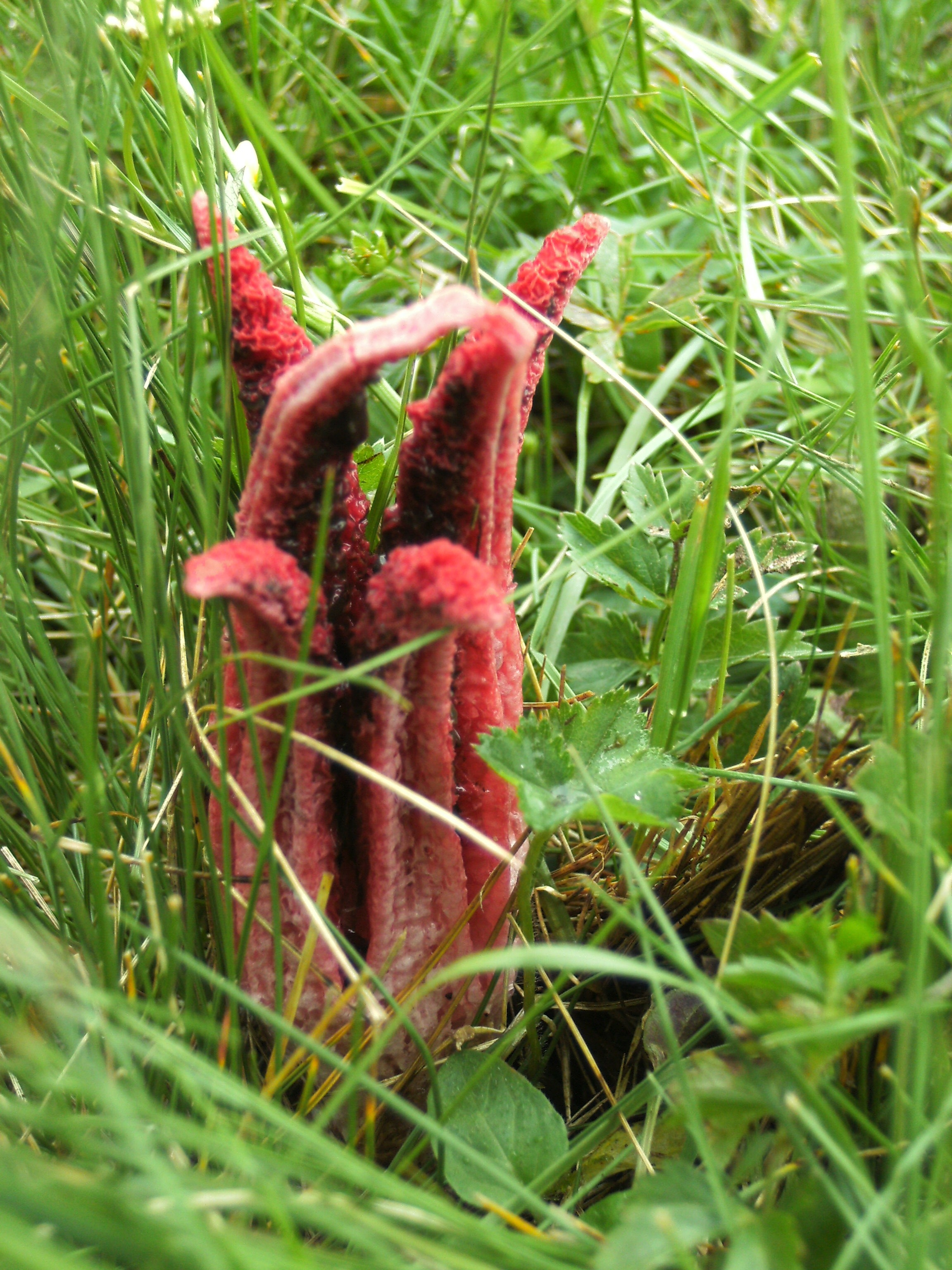 Tintenfischpilz (Clathrus archeri, syn. Anthurus archeri) - eine Pilzart aus der Gattung der Gitterlinge (Clathrus) Fundort Almwiese, Wildschönau (Österreich) Standort